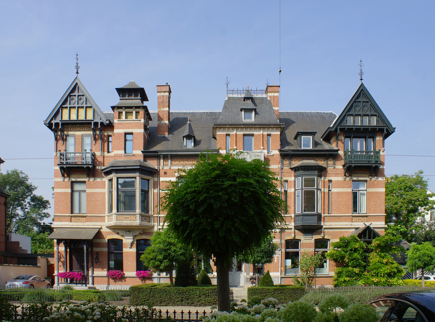 Berchem (Antwerpen), Cogels-Osylei 18, 16 & 14. Eclectisch geheel van drie burgerhuizen, ontworpen door de architecten Henri Blomme en Leonard Blomme.